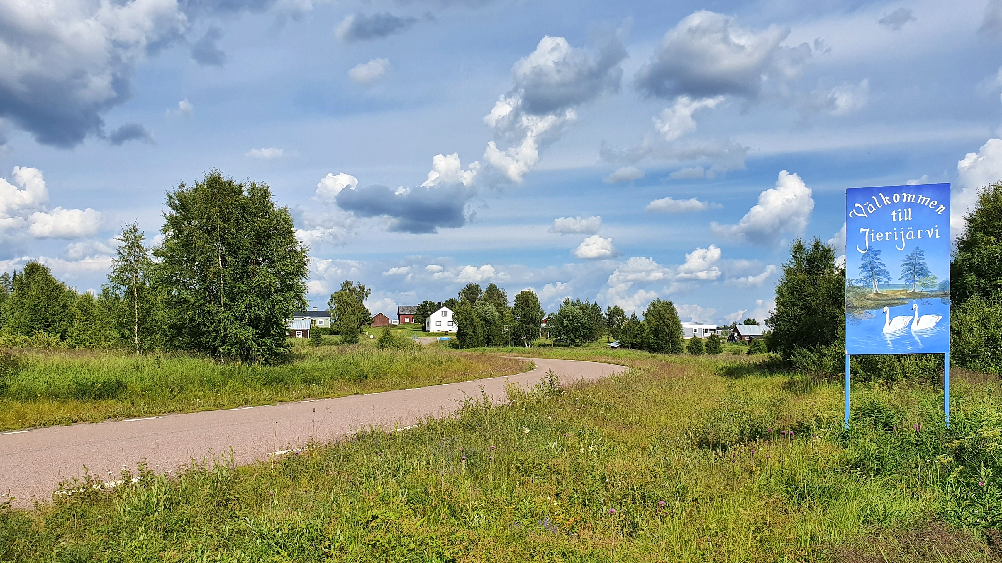 Jierijärvi är en by i Pajala kommun, Norrbottens län, belägen mellan sjöarna Jierijärvi och Säynäjärvi. Bild tagen den 21 juli 2019.